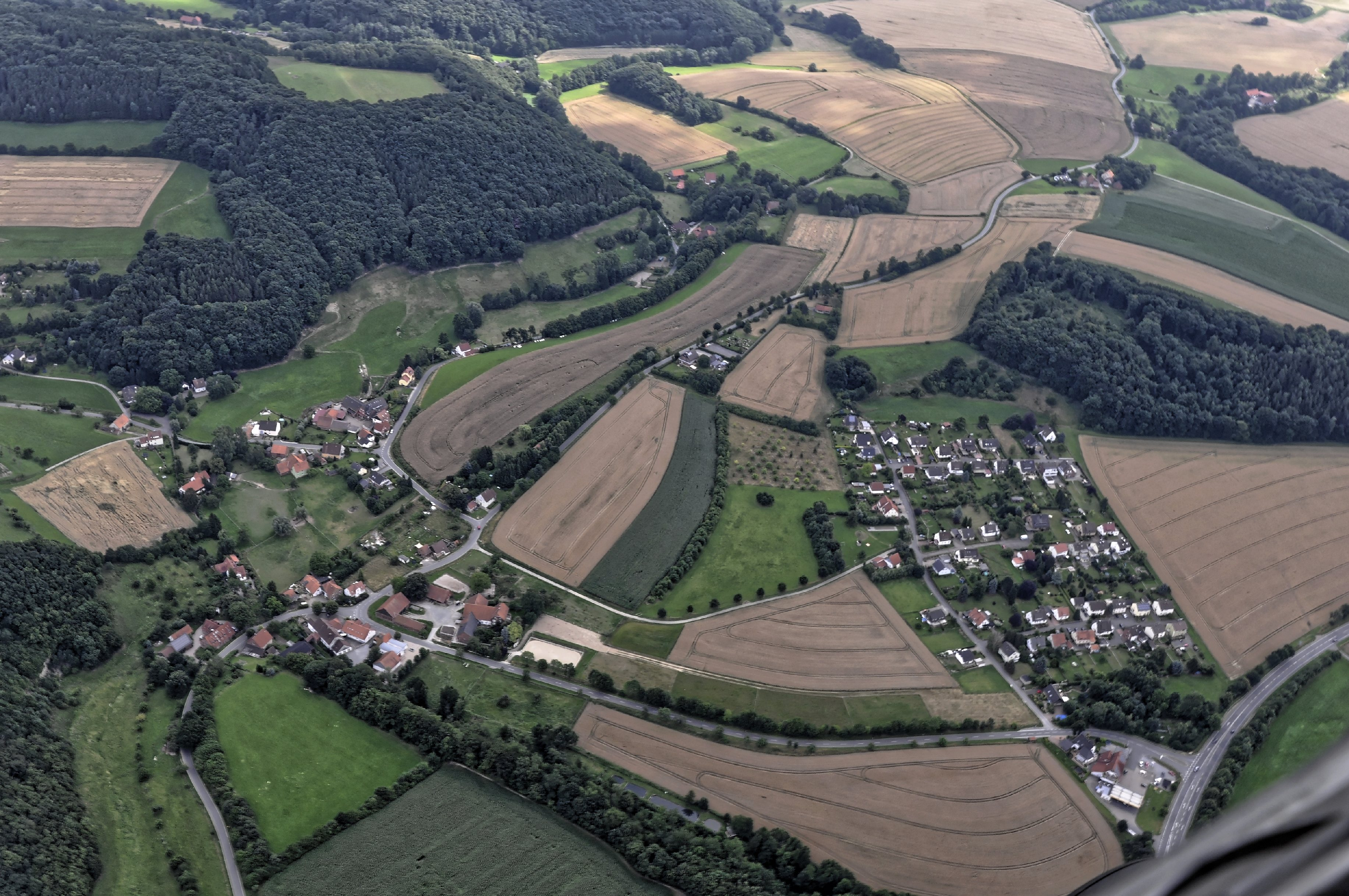 Bilder vom Flug Nordholz-Hammelburg 2015: Gemeinde Extertal - Bremke (links) und Goldener Winkel (rechts).